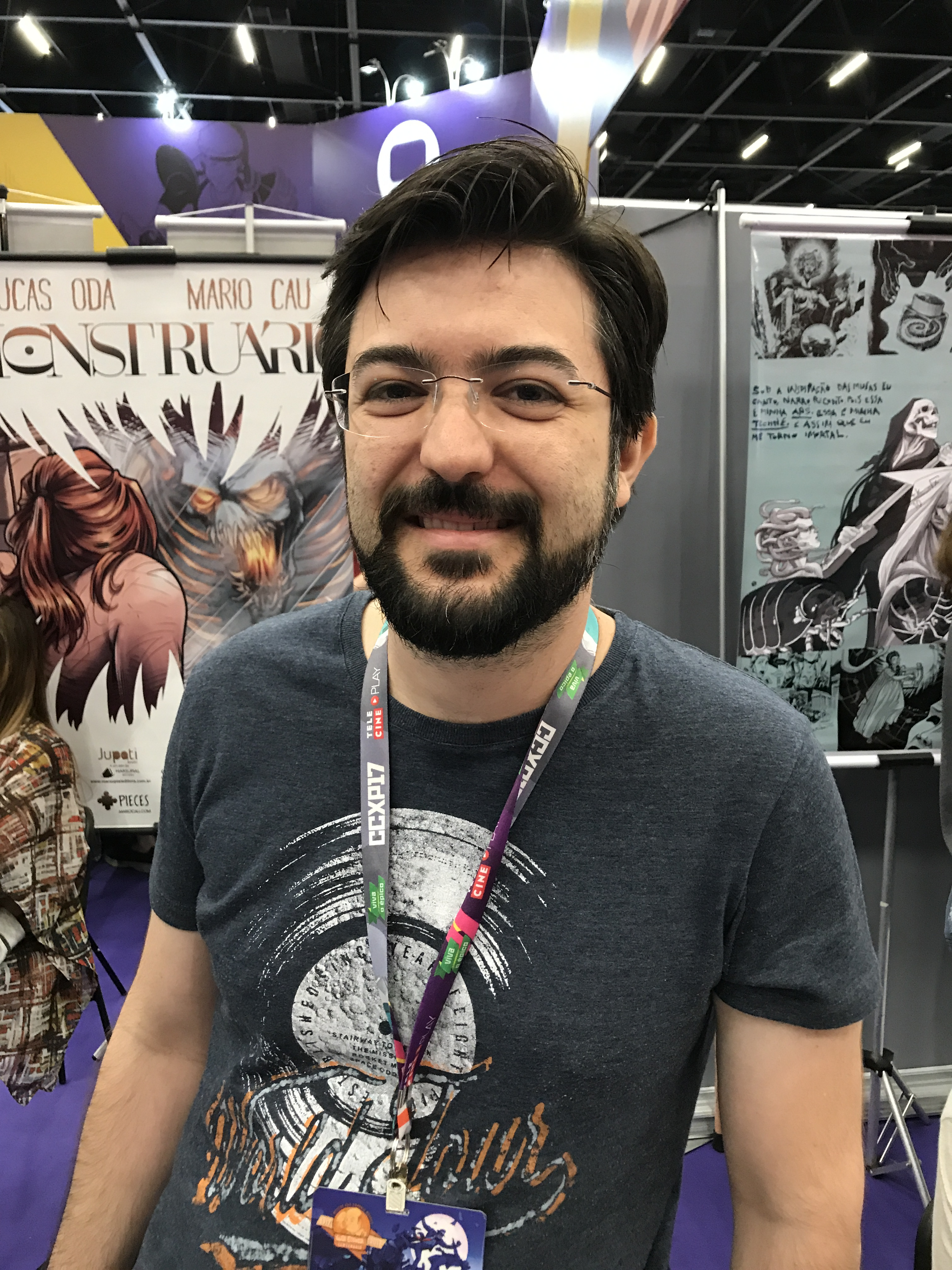 Artista Mario Cau na edição de 2017 da Comic Con Experience